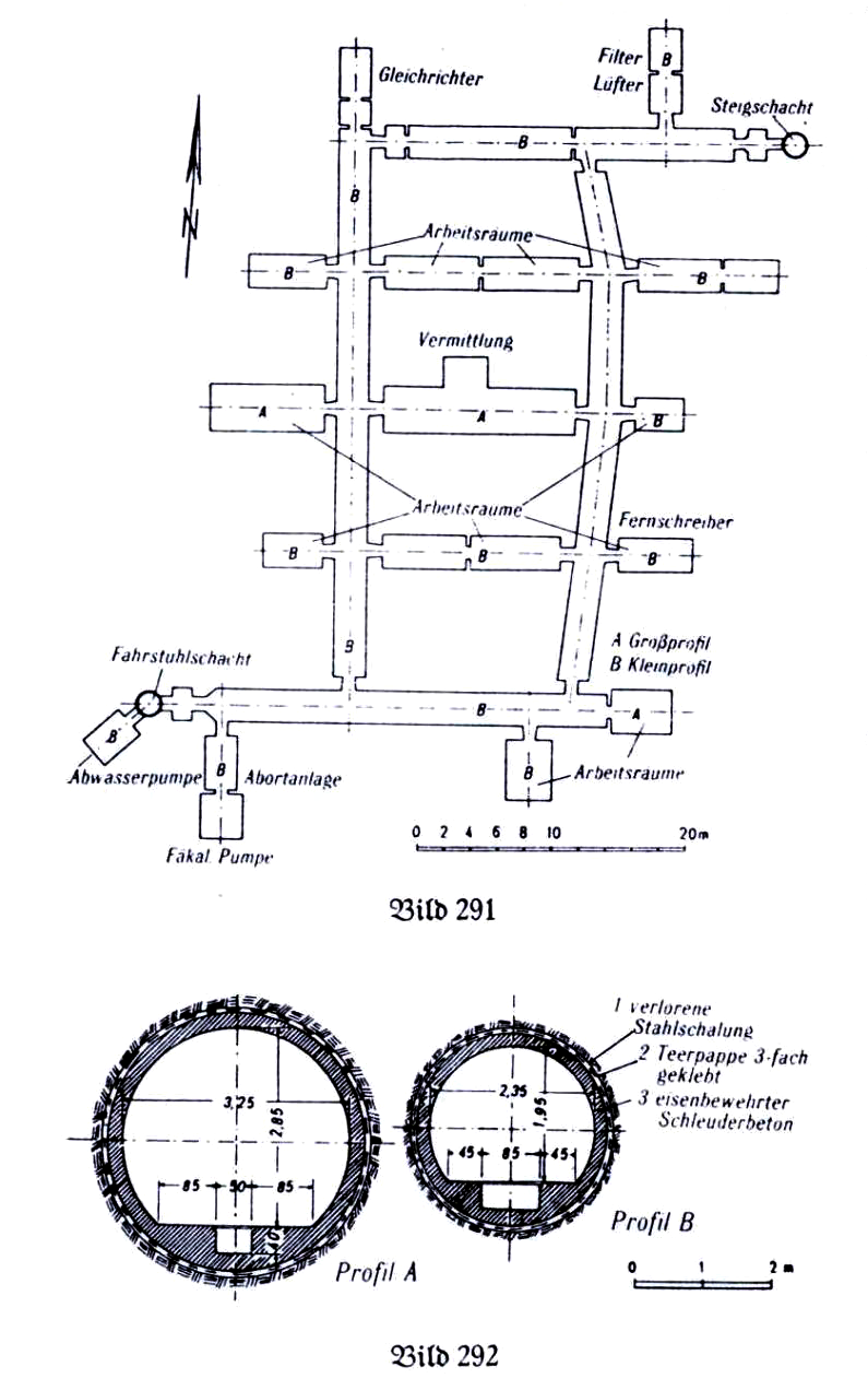 Bild 291, Bild 292